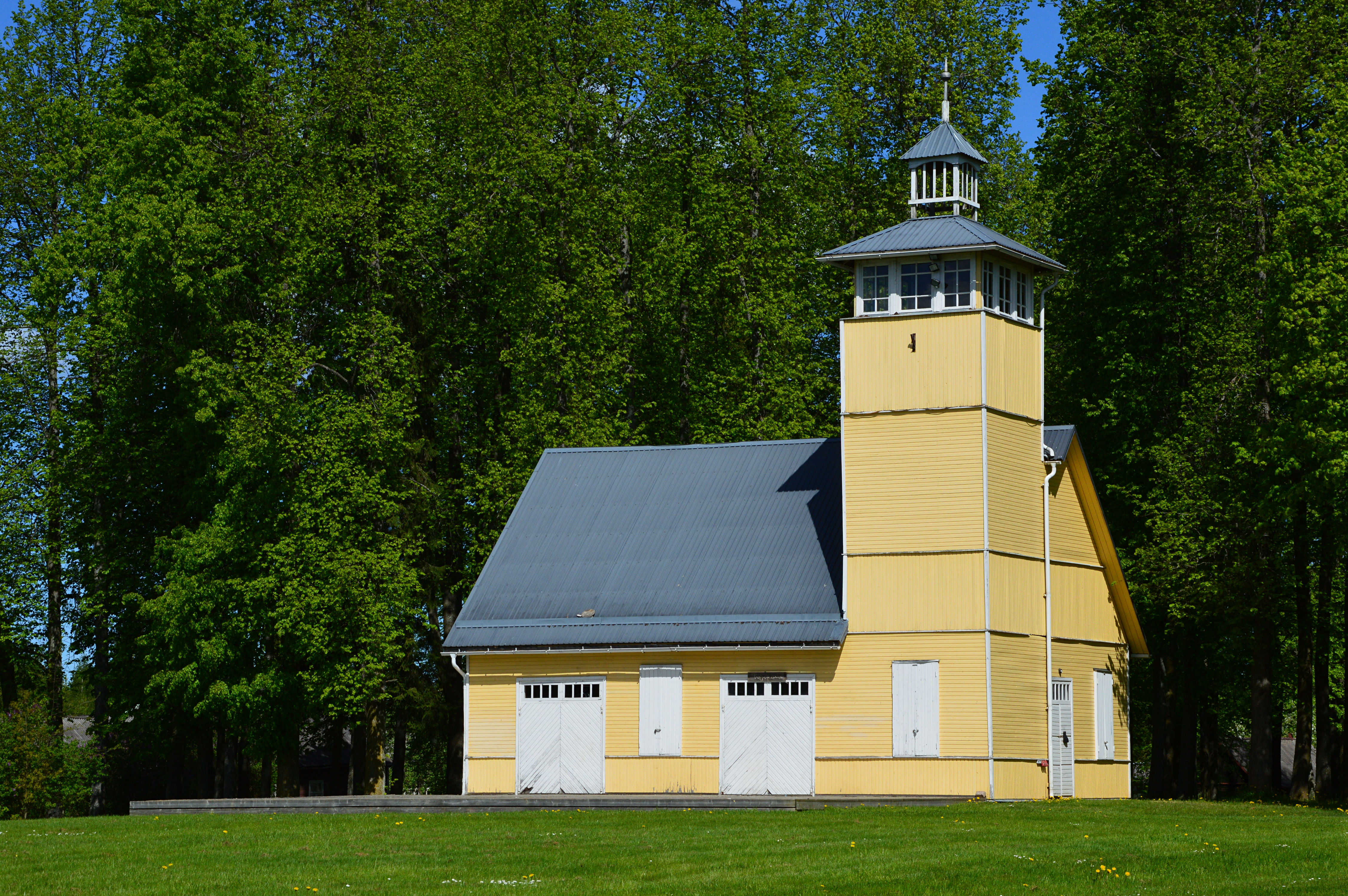 Võõpsu pritsikuur.